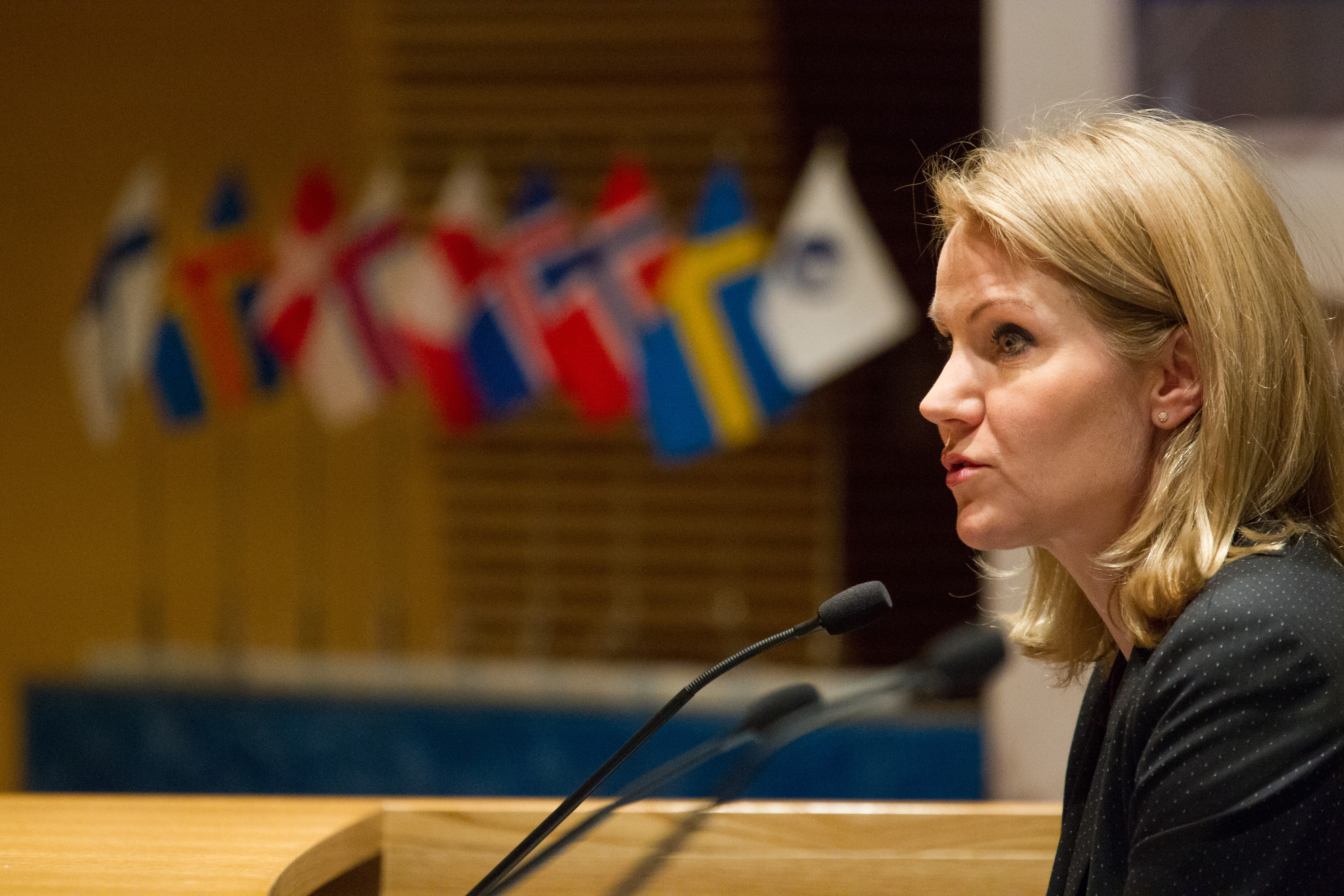 Nordiskt statsministermšöte under Nordiska rådets session i Helsingfors. Helle Thorning-Schmidt